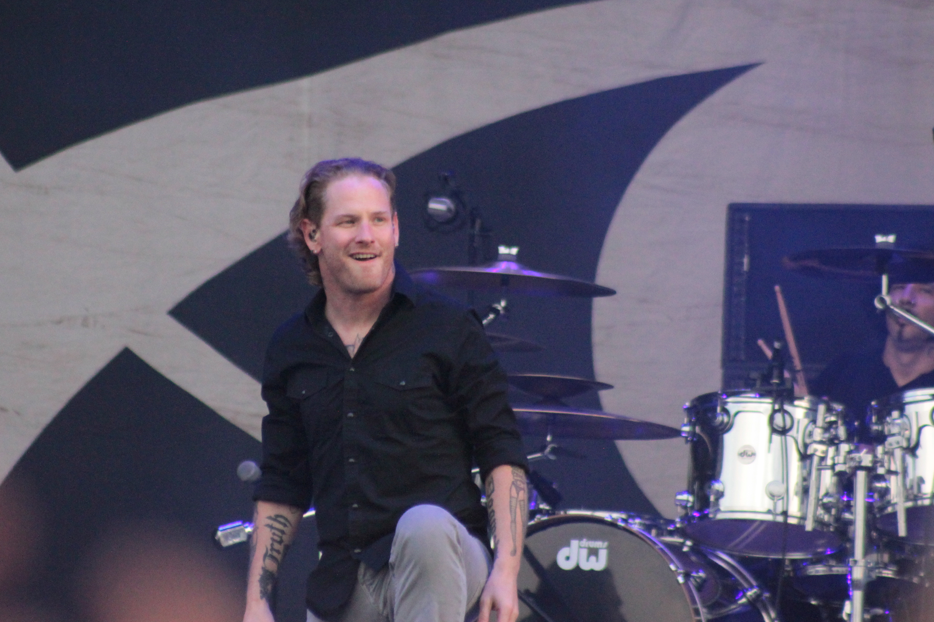 Corey Taylor, Stone Sour, Hellfest 2013, Fr-44-Clisson.